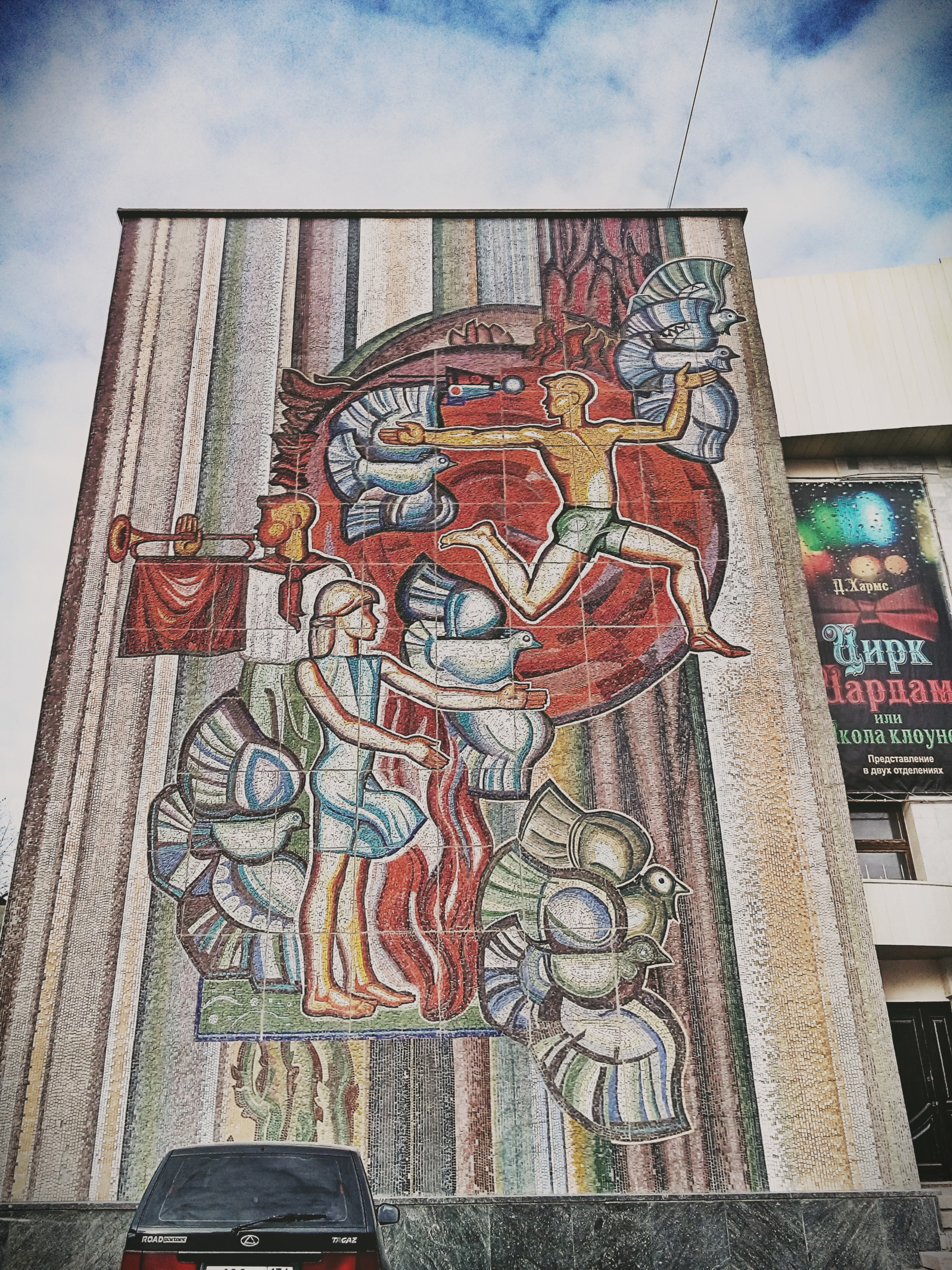 Фасад Театра Юного Зрителя в Волгограде